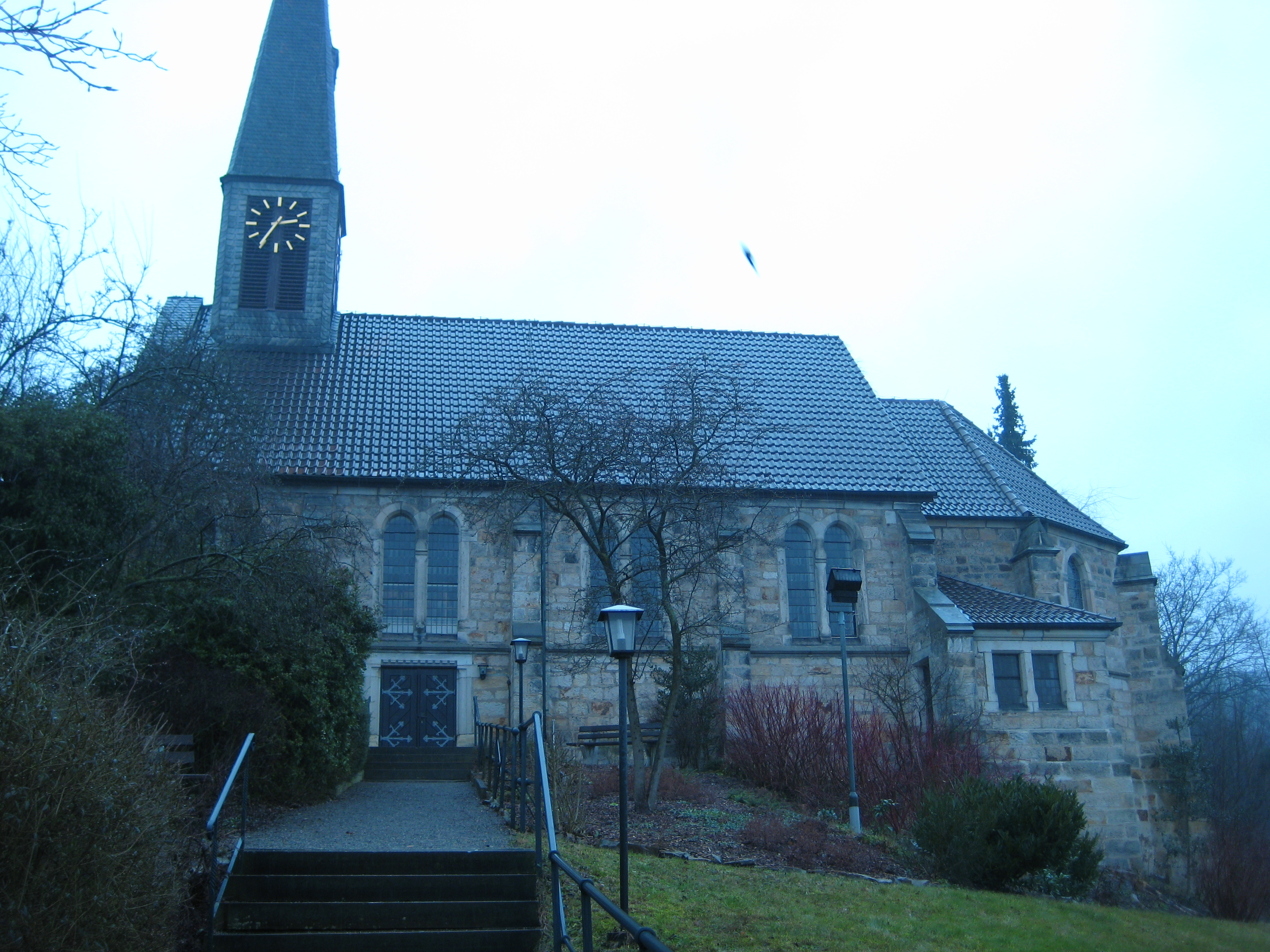 Christuskriche_osterwald_Salzhemmendorf, schlechte Aufnahme